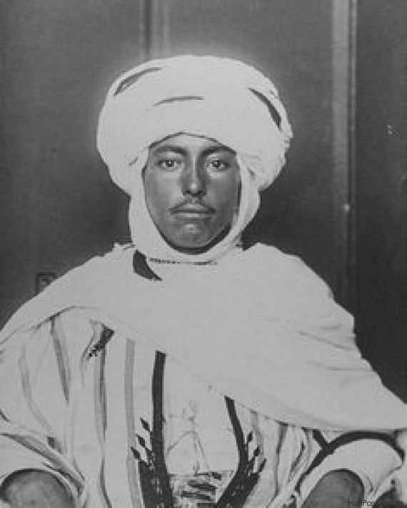 صورة فوتوغرافية لأول مهاجر جزائري للولايات المتحدة الأمريكية سنة 1892 للمصور الأمريكي "أوغوست شارمان" توجد الصورة في متحف الهاجرين بنيويورك.